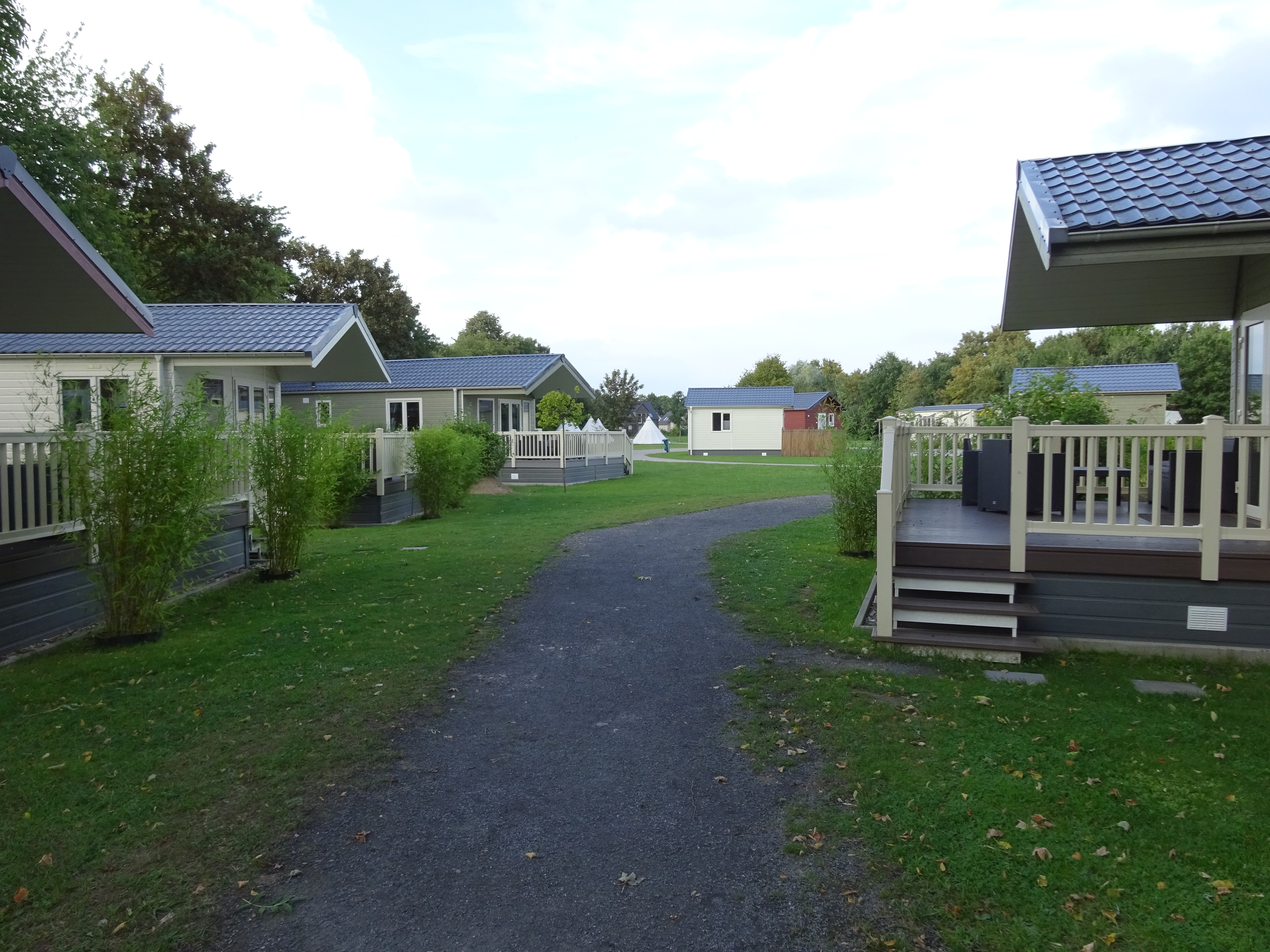 Kalkar-Wissel, Zum Wisseler See 15, Campingplatz